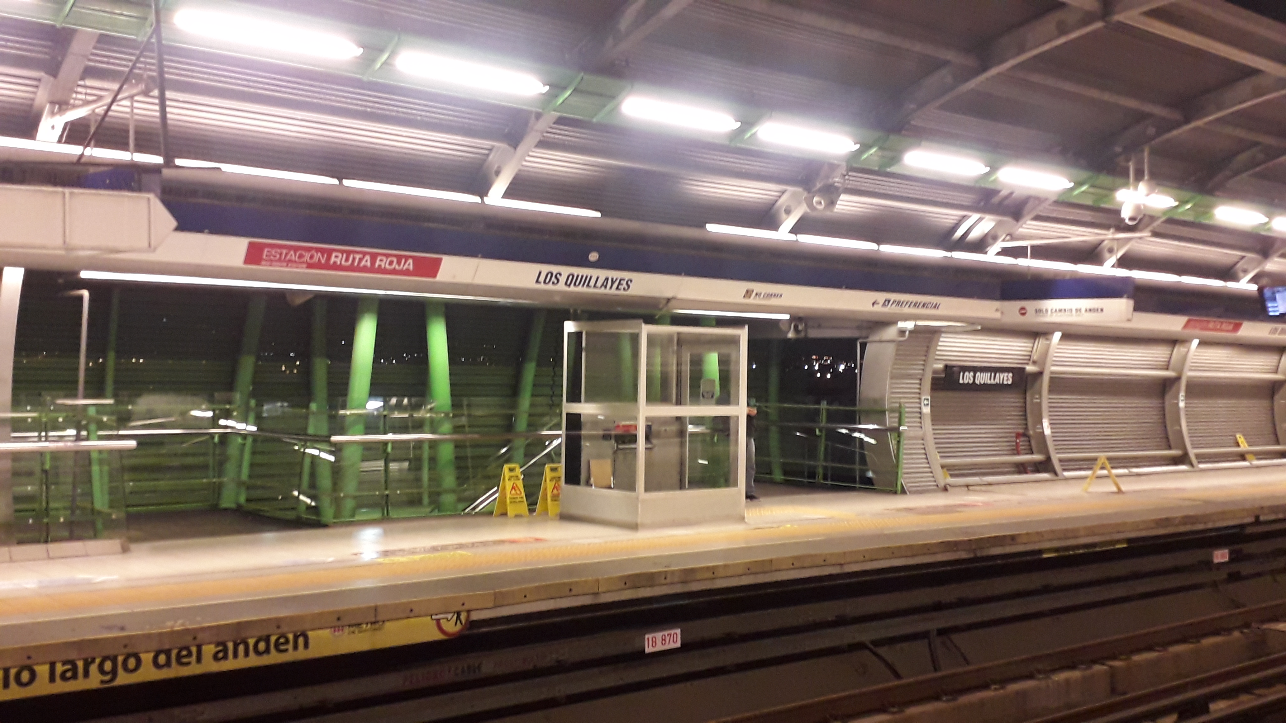 Estación Los Quillayes Línea 4.